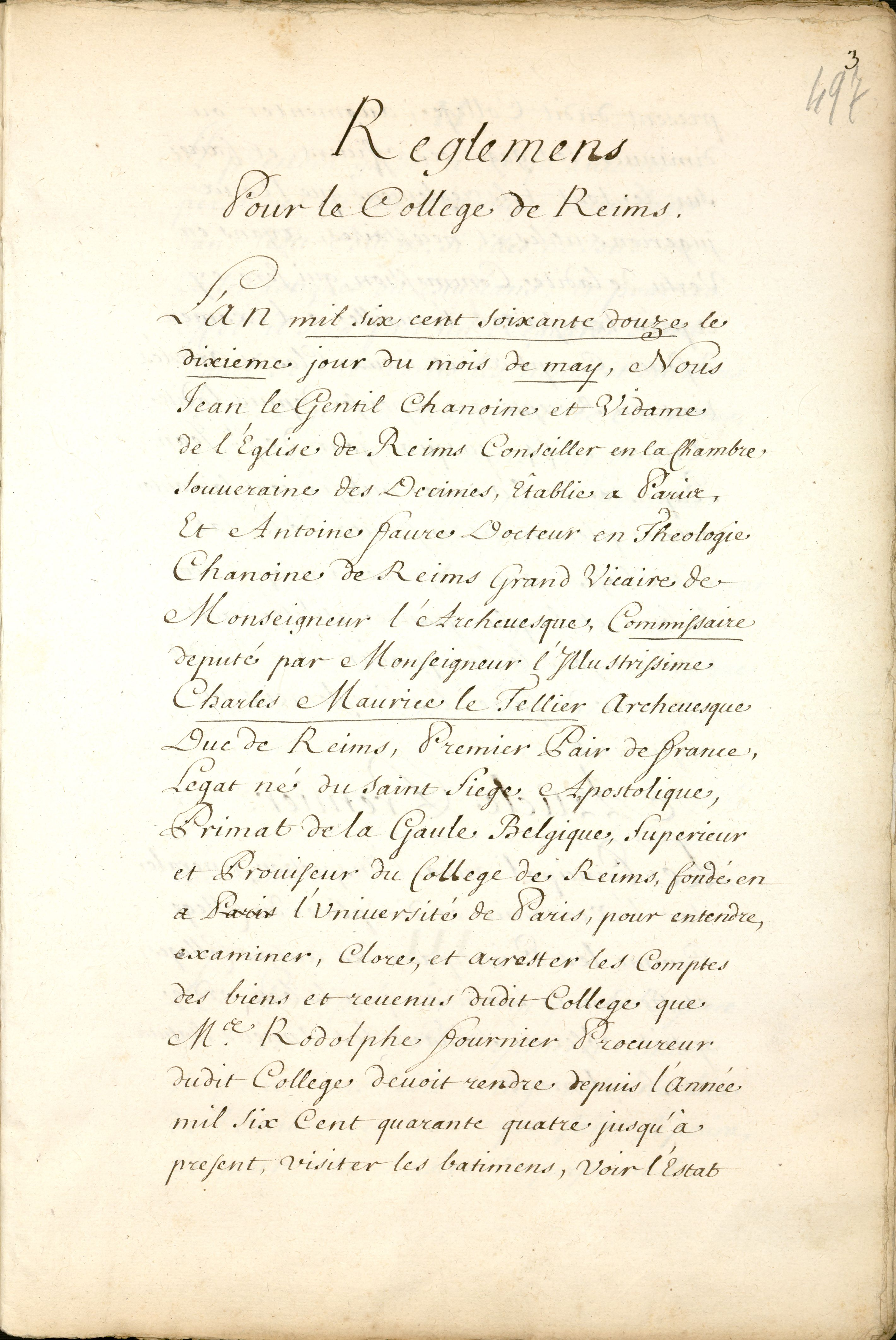 Manuscrit, dans un registre de 738 feuillets consacré aux fondations et statuts des collèges.